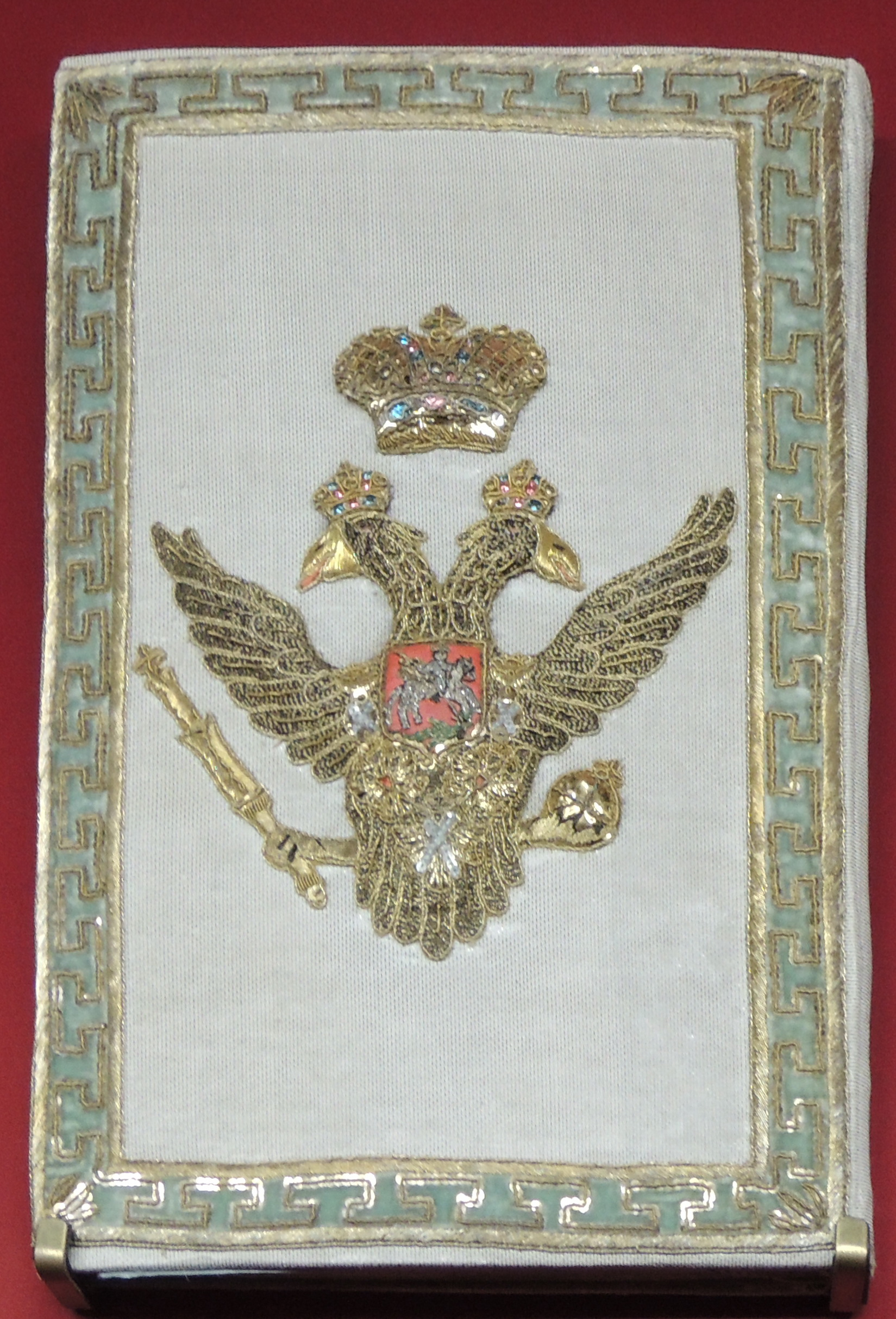 Учреждение об императорской фамилии. Санкт-Петербург, 1797. Бумага, чернила, сургуч, картон, глазет, шелк, бархат; рукопись, ткачество, шитье золотными нитями, золочение. 33х21, 83 л. Музеи Московского Кремля. инв. №КН-226. Выставка "Венчания на царство и коронации в Московском Кремле" (2013)